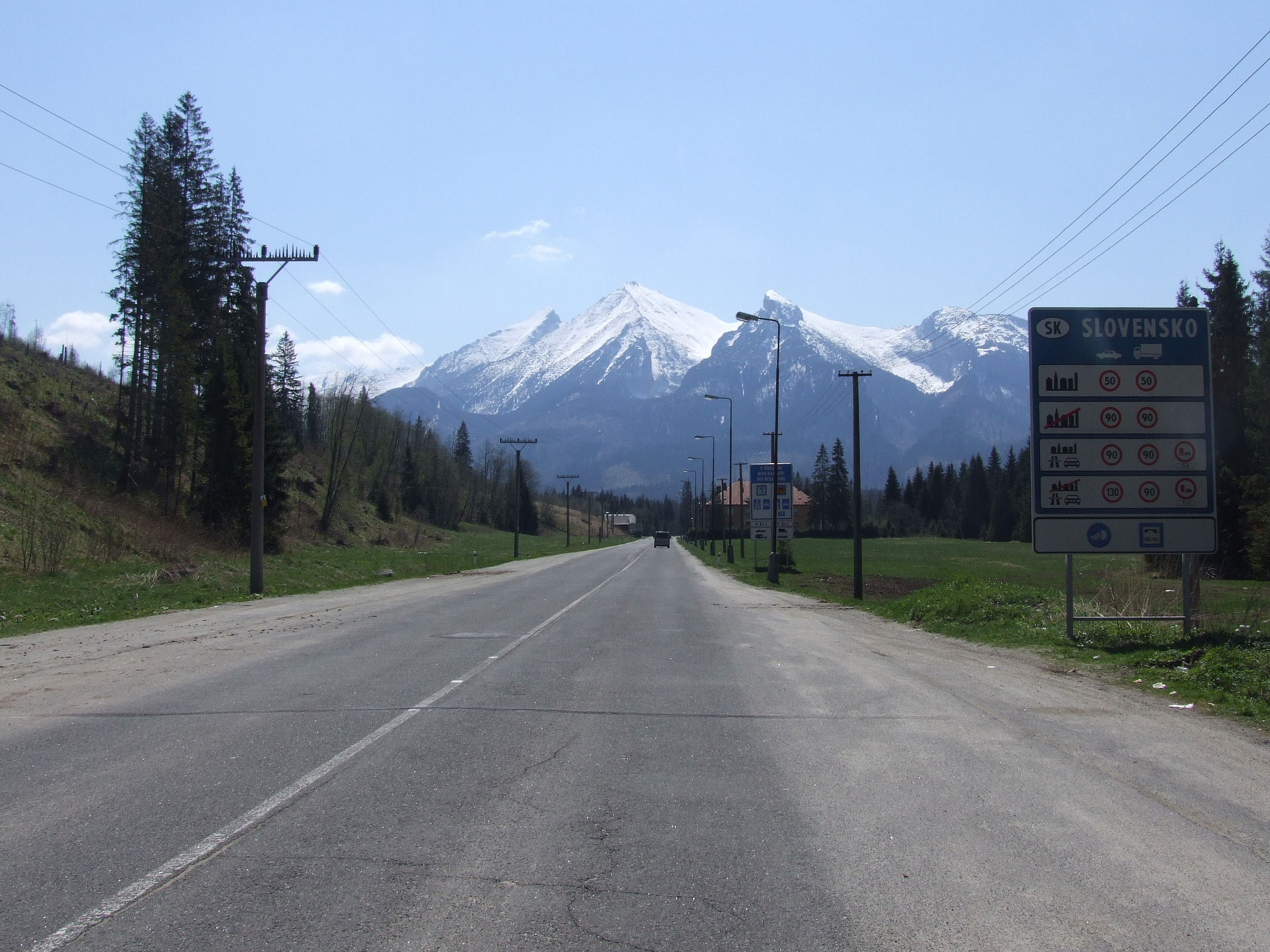 Droga krajowa nr 49, tuz za polską granicą